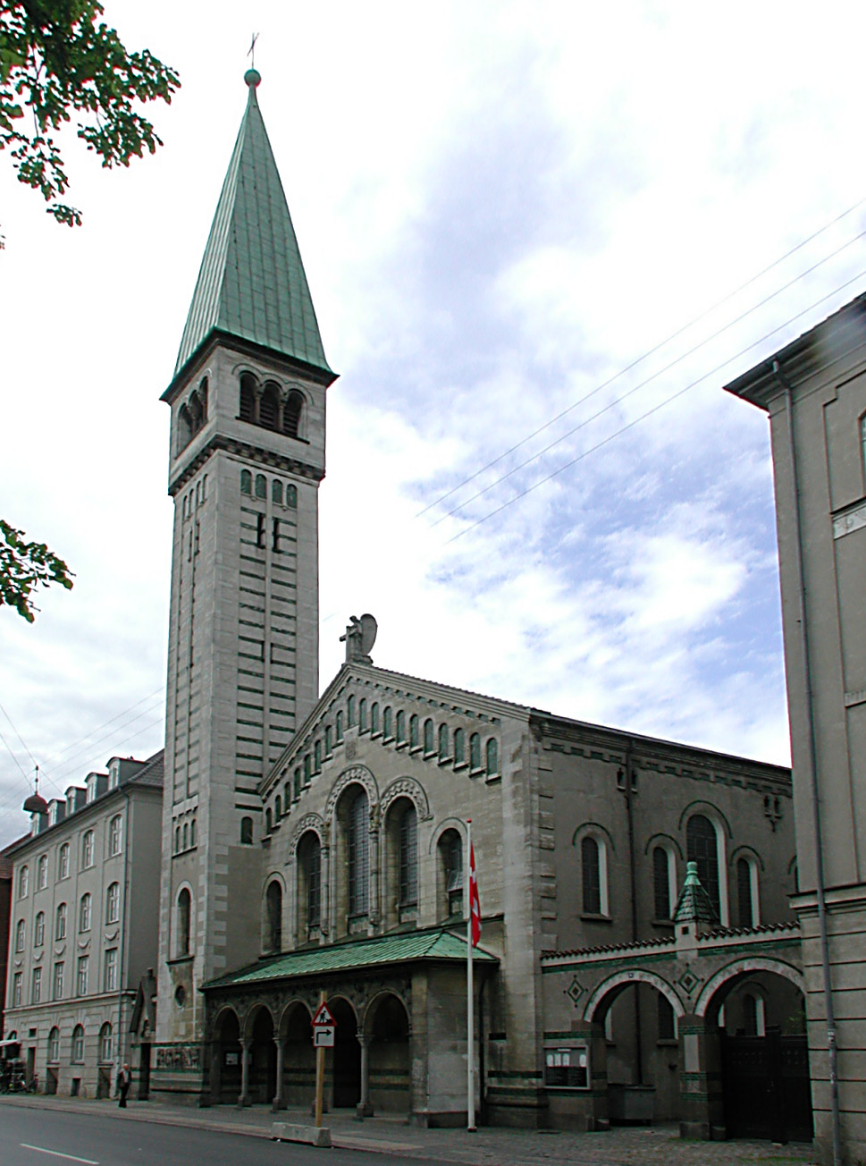 Kristkirken, Copenhagen, Denmark.